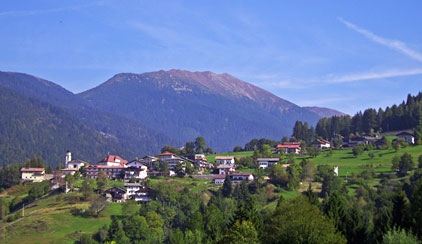 San Felice dal paese di Sant'Orsola.